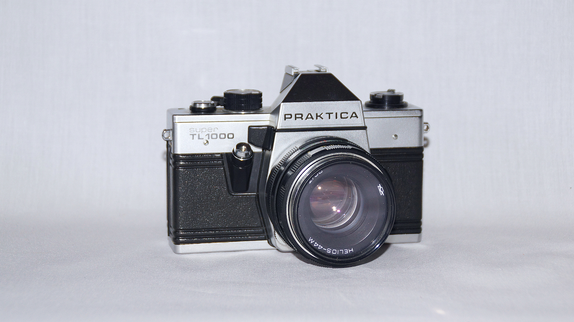 Praktica super TL 1000 - Foto Wolfgang Pehlemann DSC04882